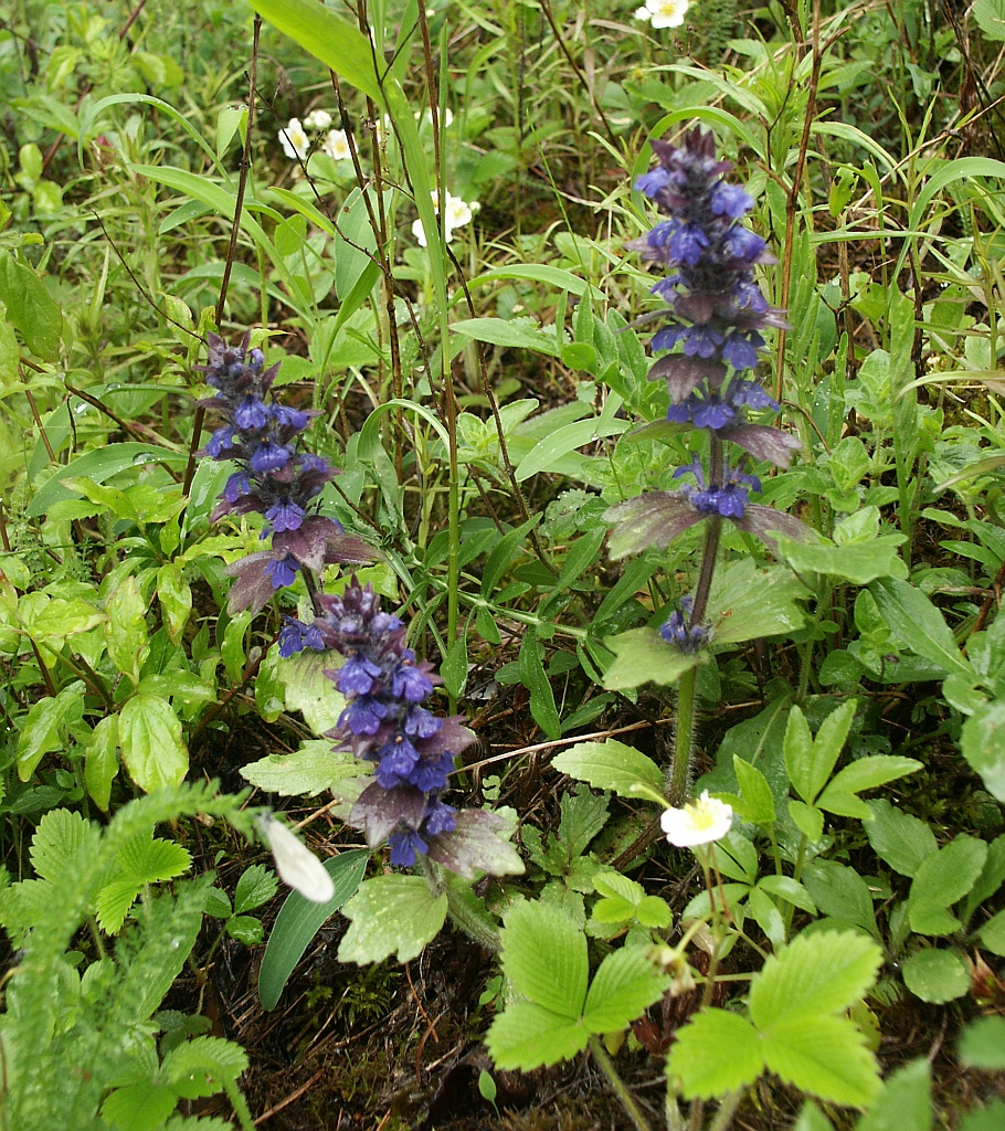 Ajuga genevensis, Tauberland, Germany